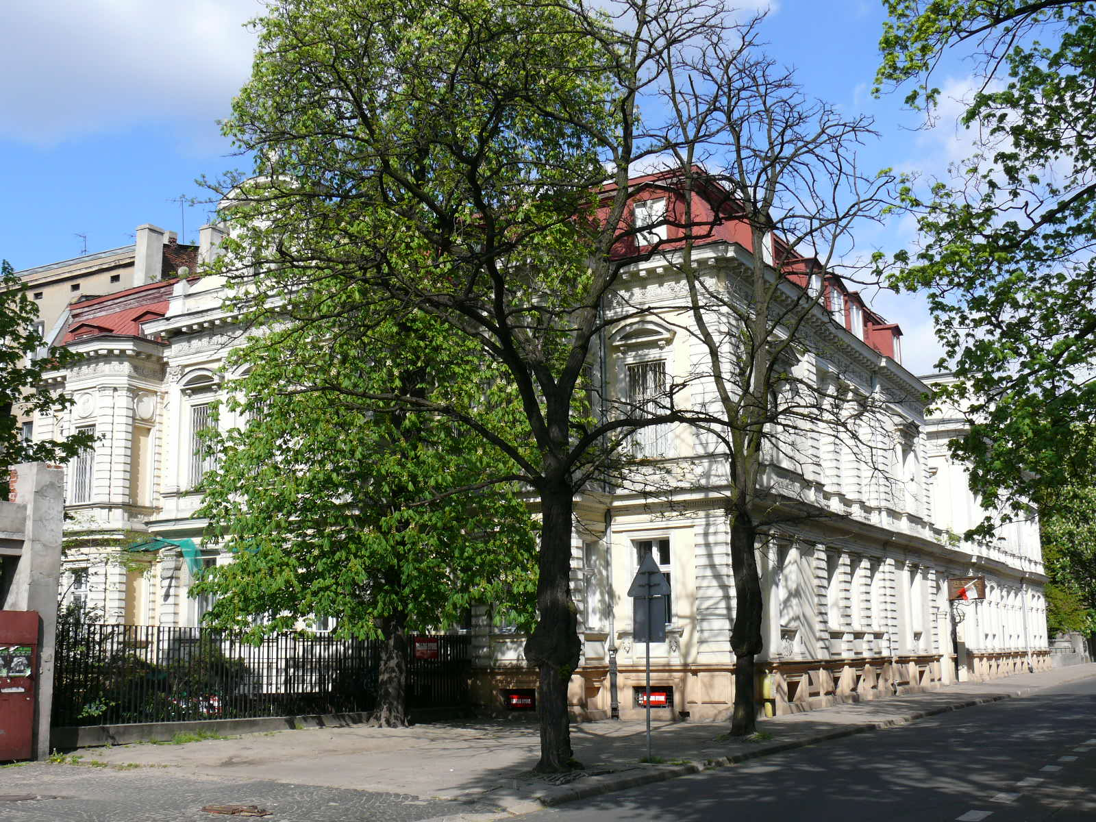 Ulica Moniuszki 6 w Łodzi